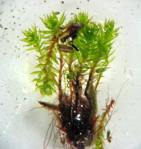 Bryum subapiculatum, Rostock